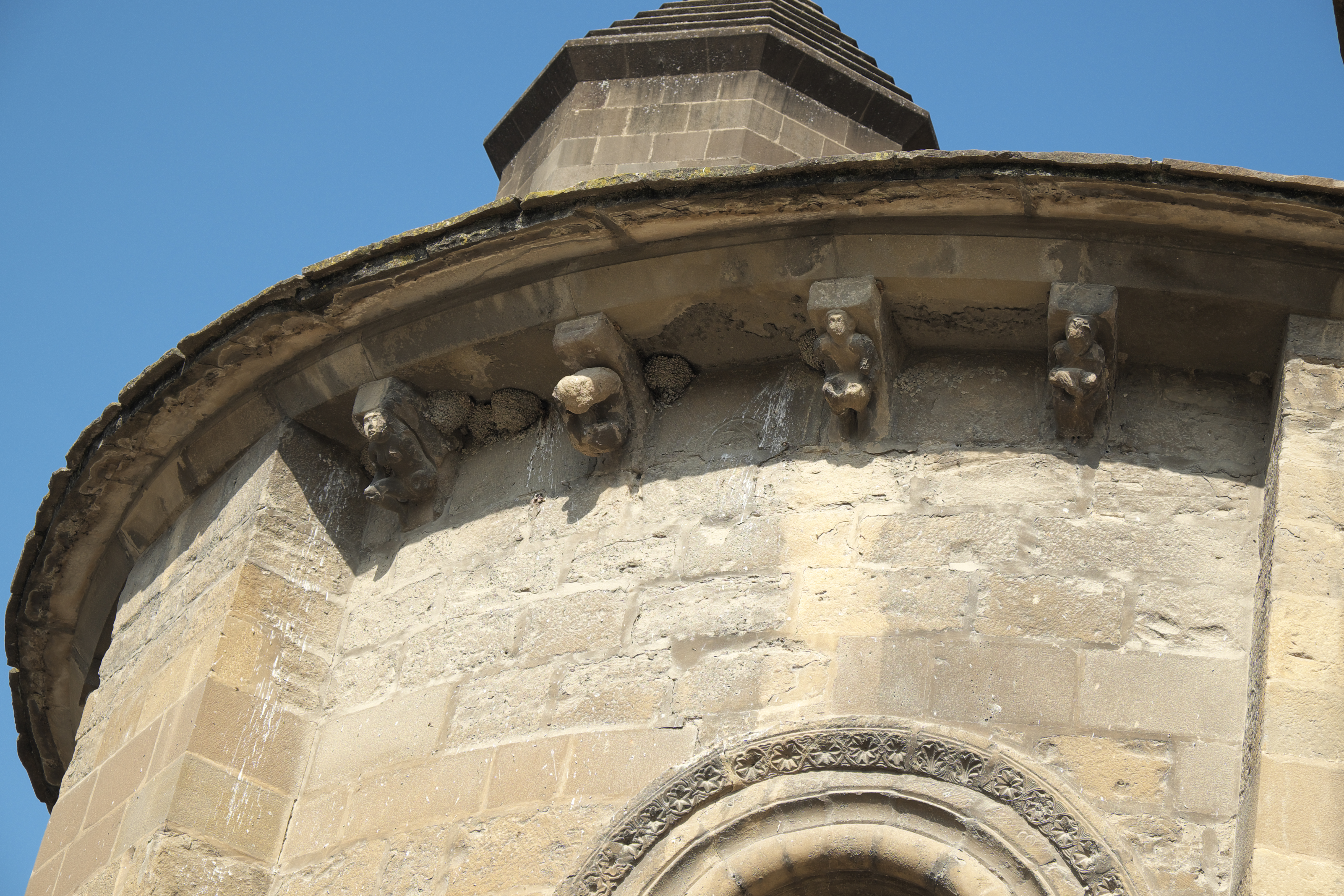 Kirche Santa María la Real in Sangüesa in der Region Navarra (Spanien), Kragsteine an der Apsis